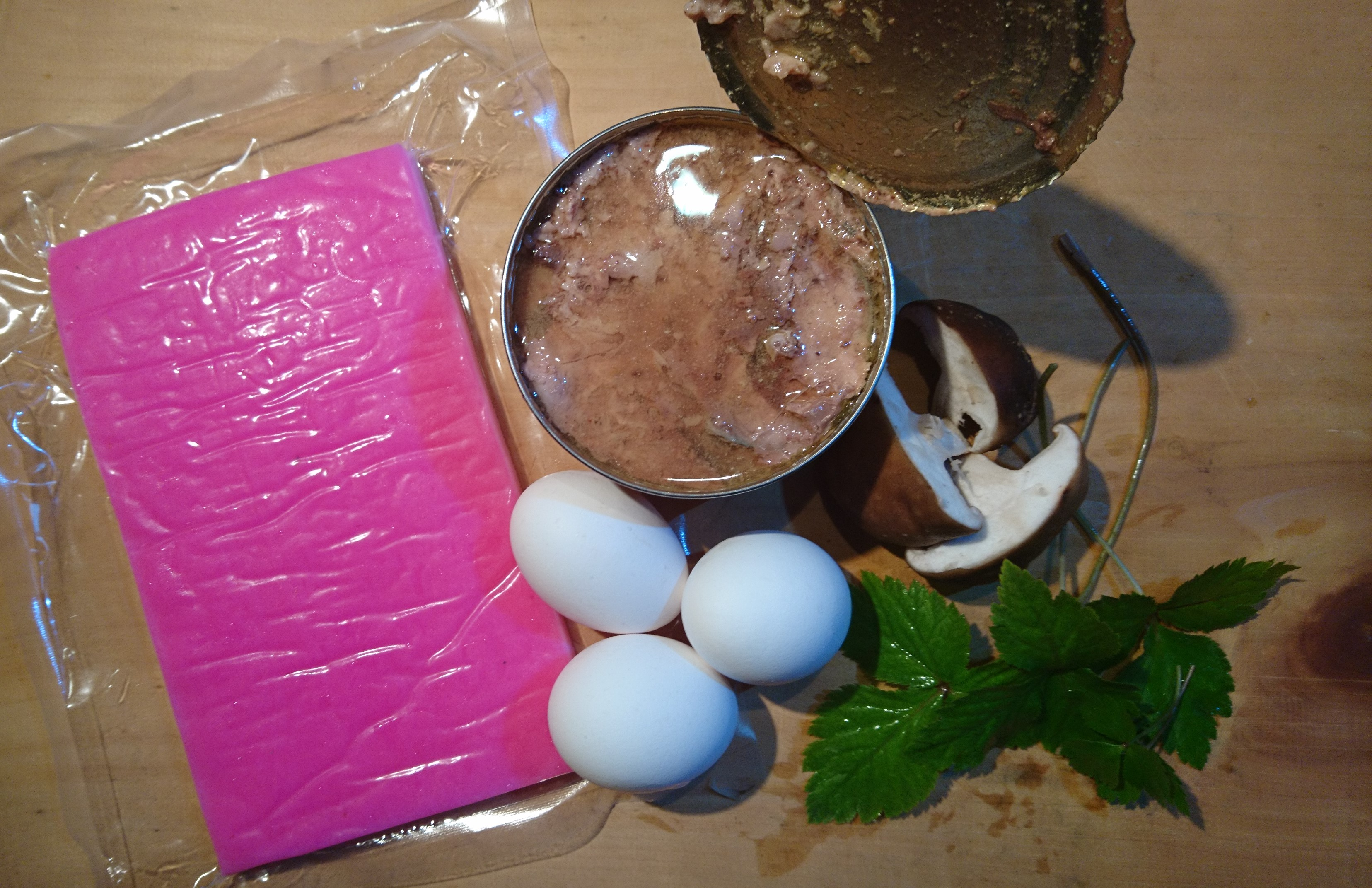 丹後地方の郷土料理「ばらずし」の食材の一例。サバ缶(平1号缶)、がんぎ(板蒲鉾)、卵、しいたけ、青物(画像はミツバ)など。